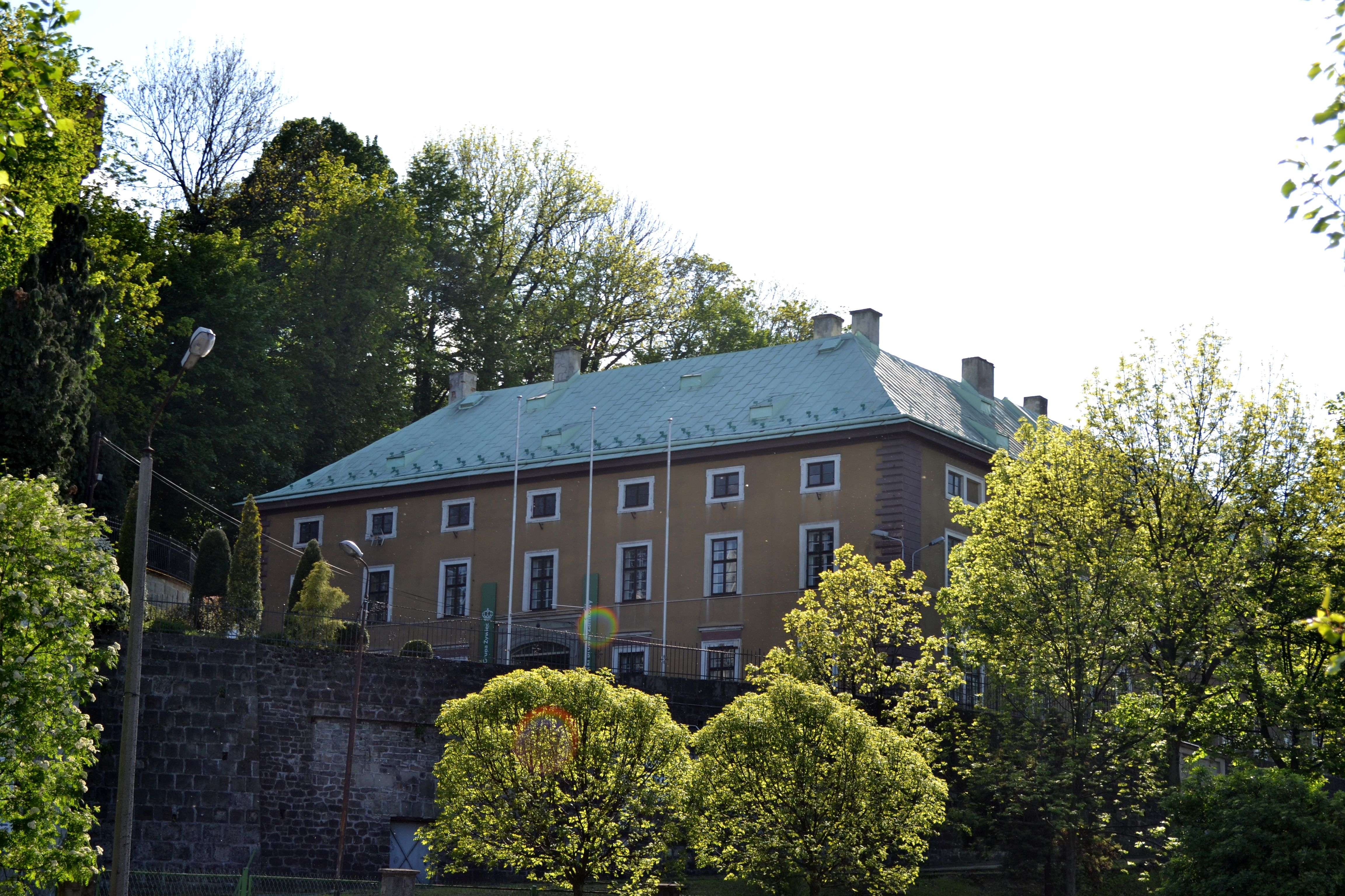 Cieszyn, budynek browaru I, 1 poł. XIX w.